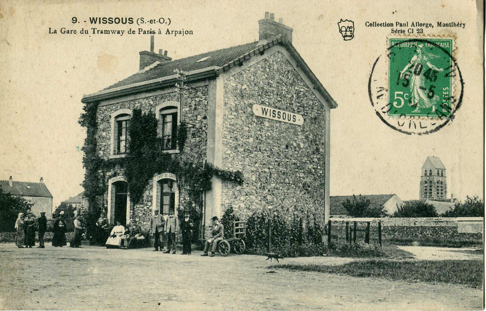 Carte postale ancienne éditée par Paul Allorge à Montlhéry, n° 9, mention Série Cl 23 : WISSOUS - La gare du Tramway de Paris à Arpajon